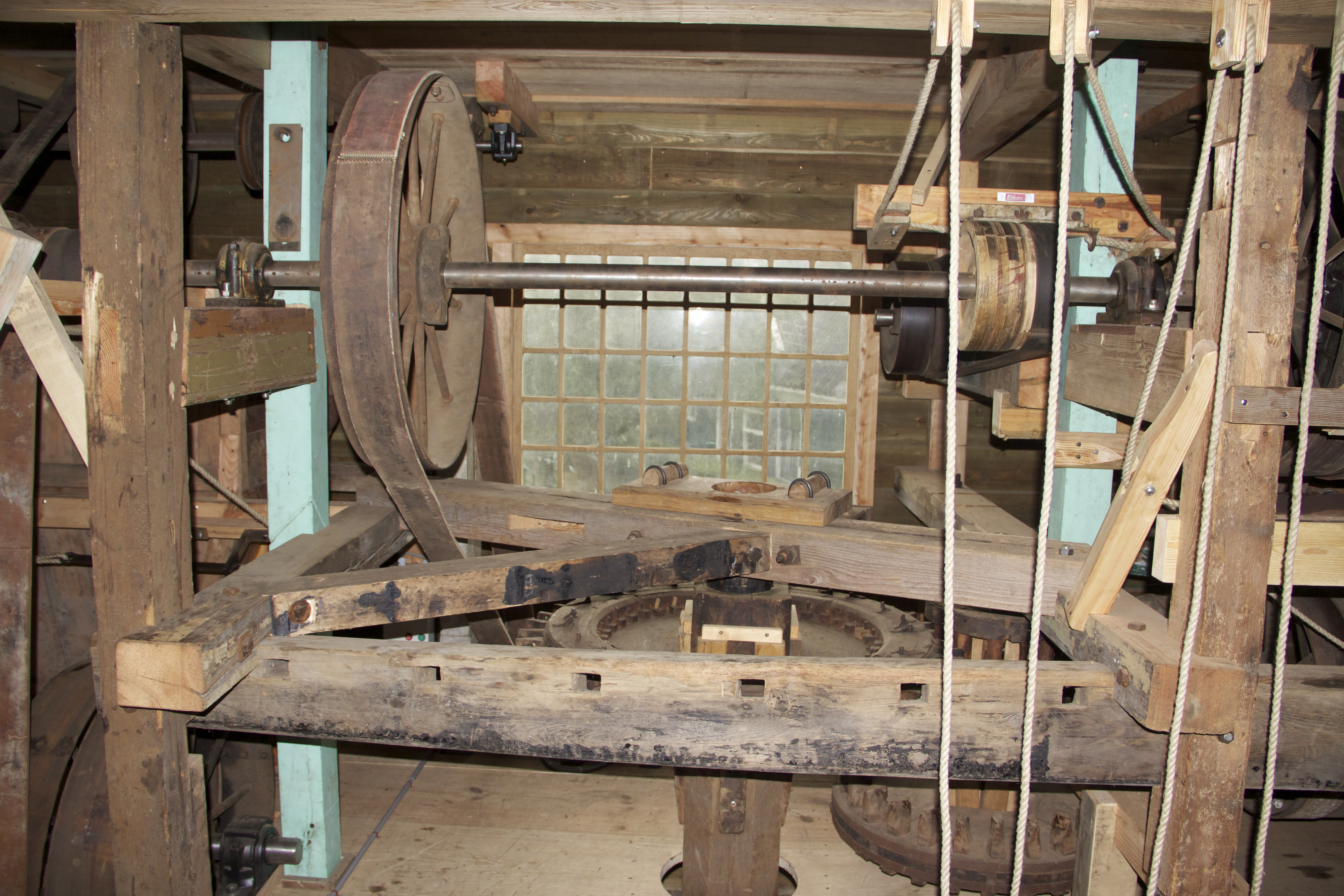 overbrengingen in molen de huisman